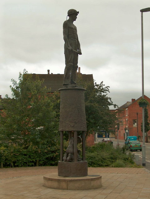 Collier in Bronze